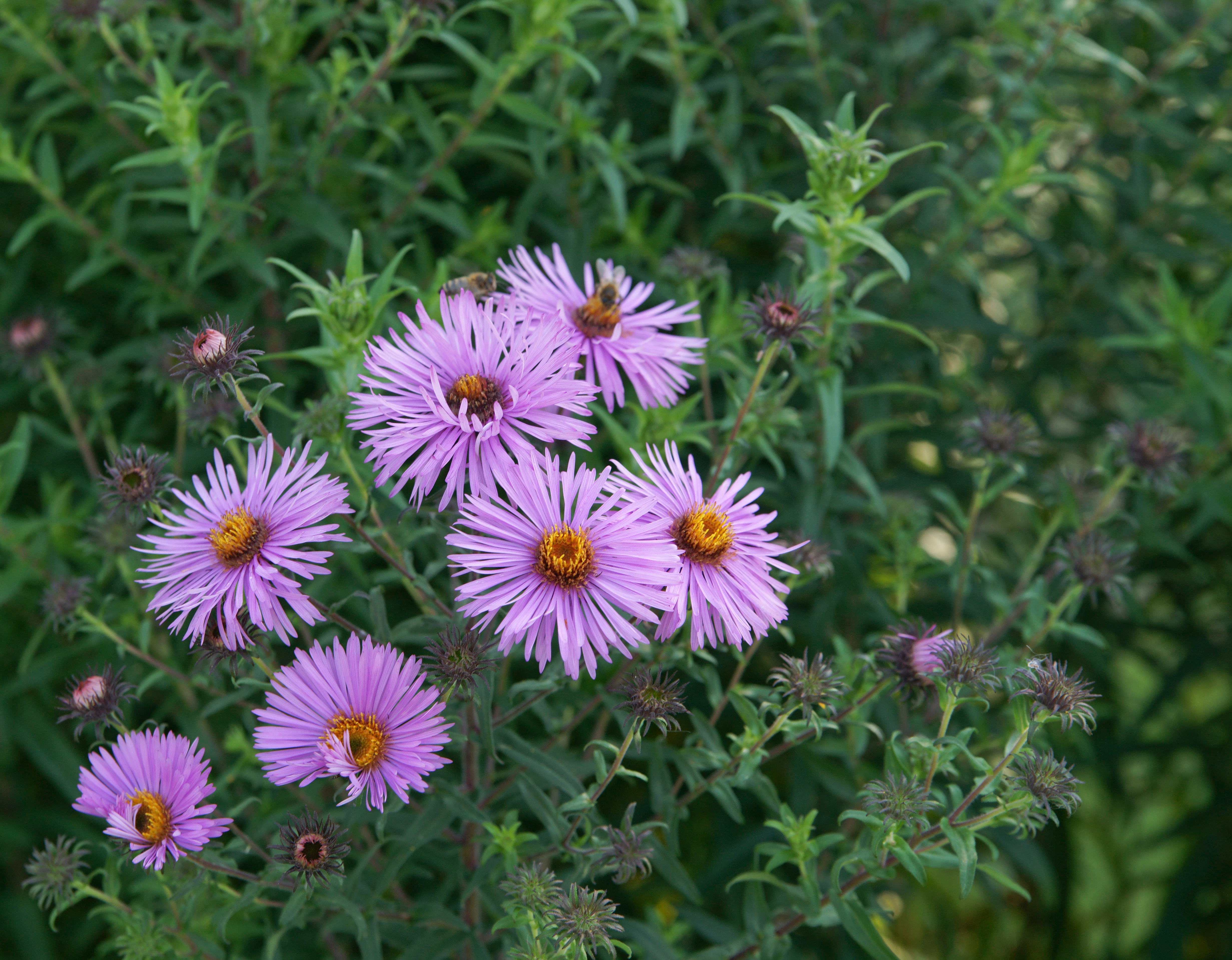 Aster novae-angliae 'Barr's Pink'. ProSpecieRara-Zierpflanzengarten Elfenau Bern.